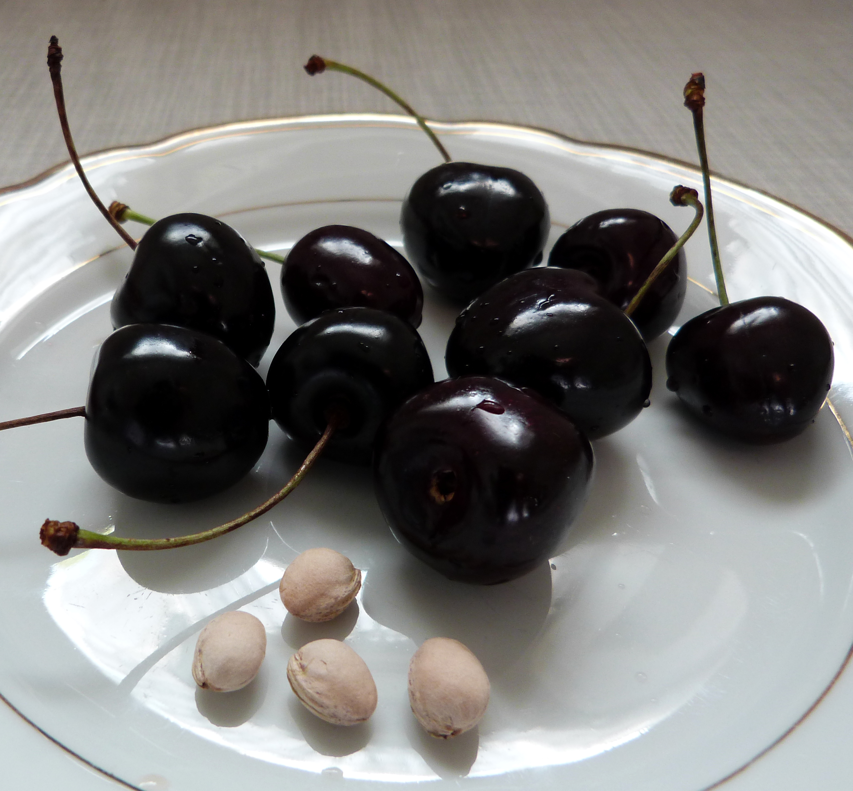 Kirschen der Sorte Kordia, Mittelfranken, gekauft 28. Juli 2016